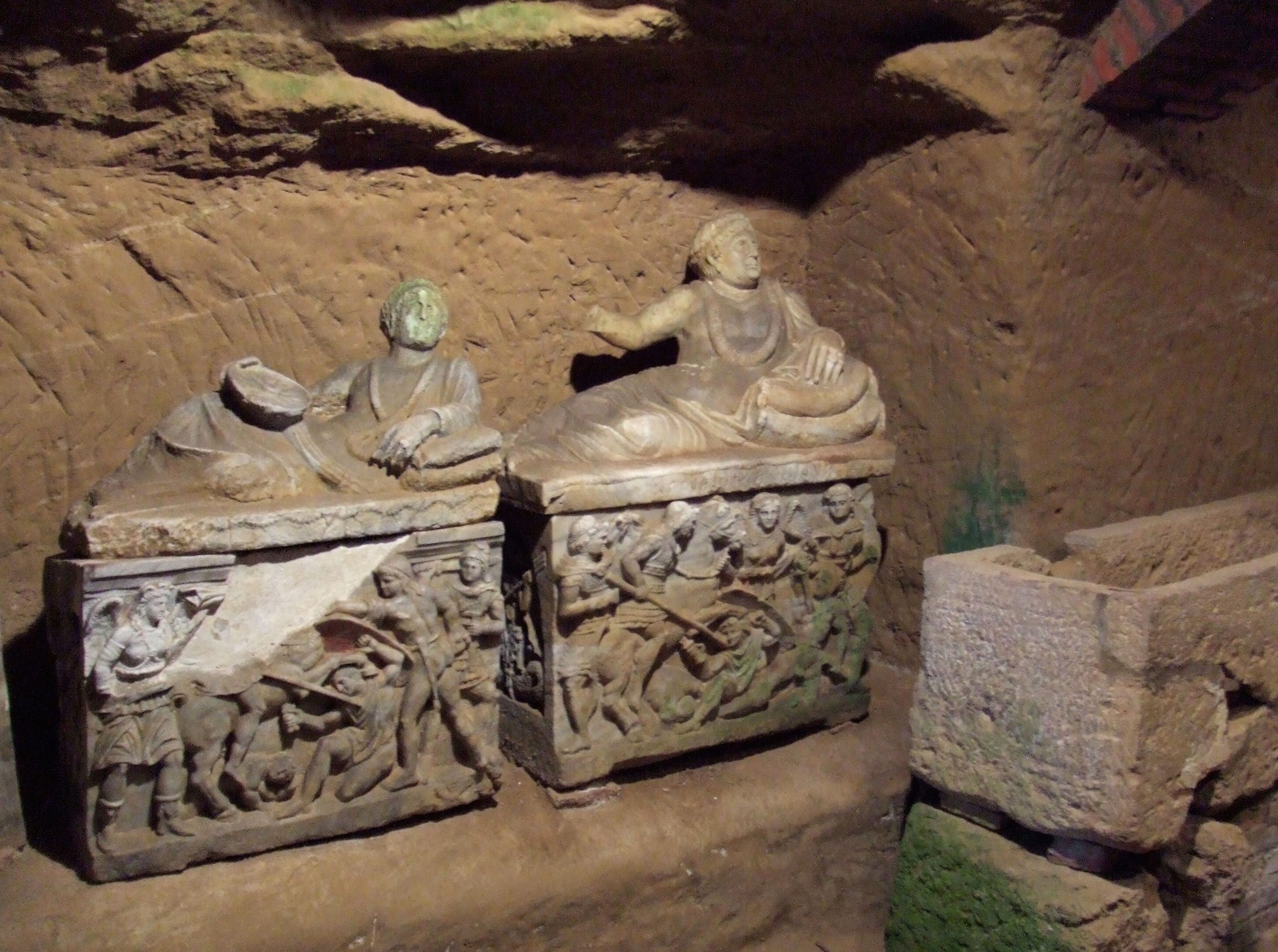 Tomba della pellegrina - sarcophages figurés en albâtre de la chambre centrale